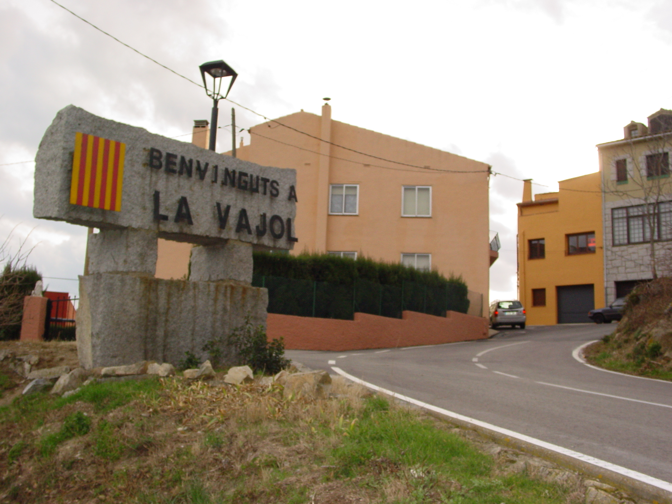 Entrada al municipi de la Vajol